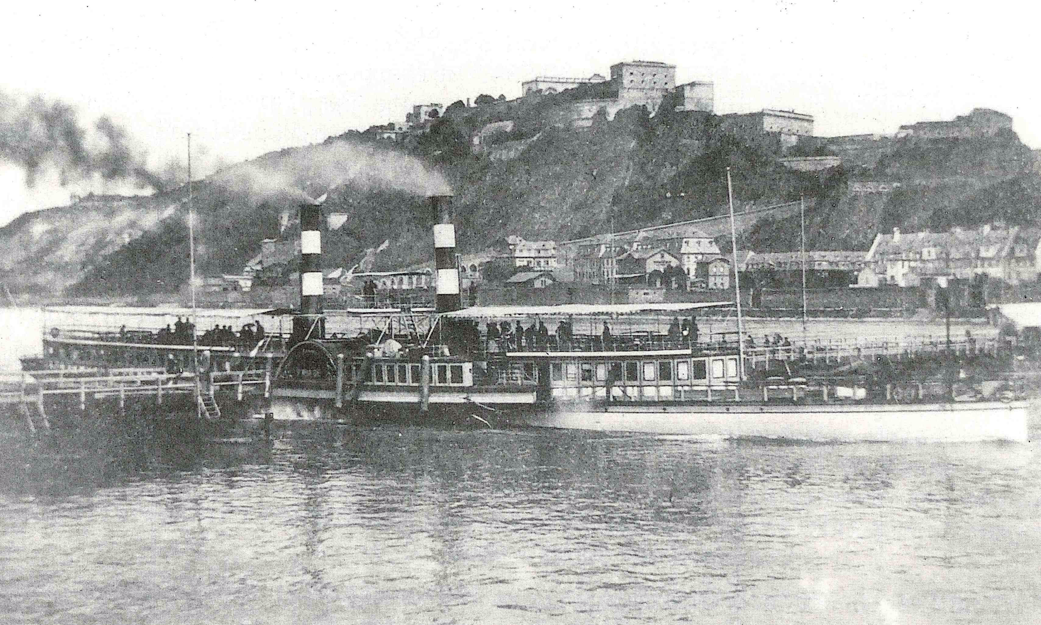 Der Raddampfer Friede in Koblenz.